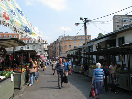 Pijaca Bajloni